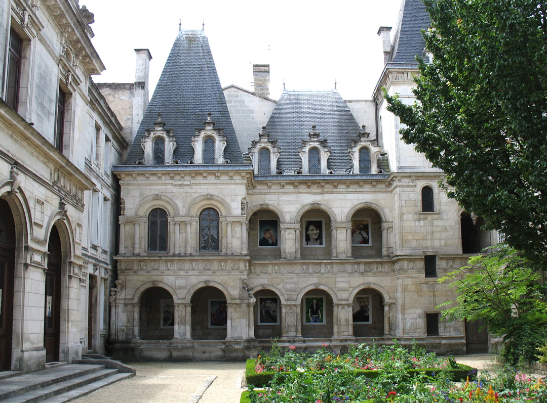 La Rochelle, maison Henri II, France